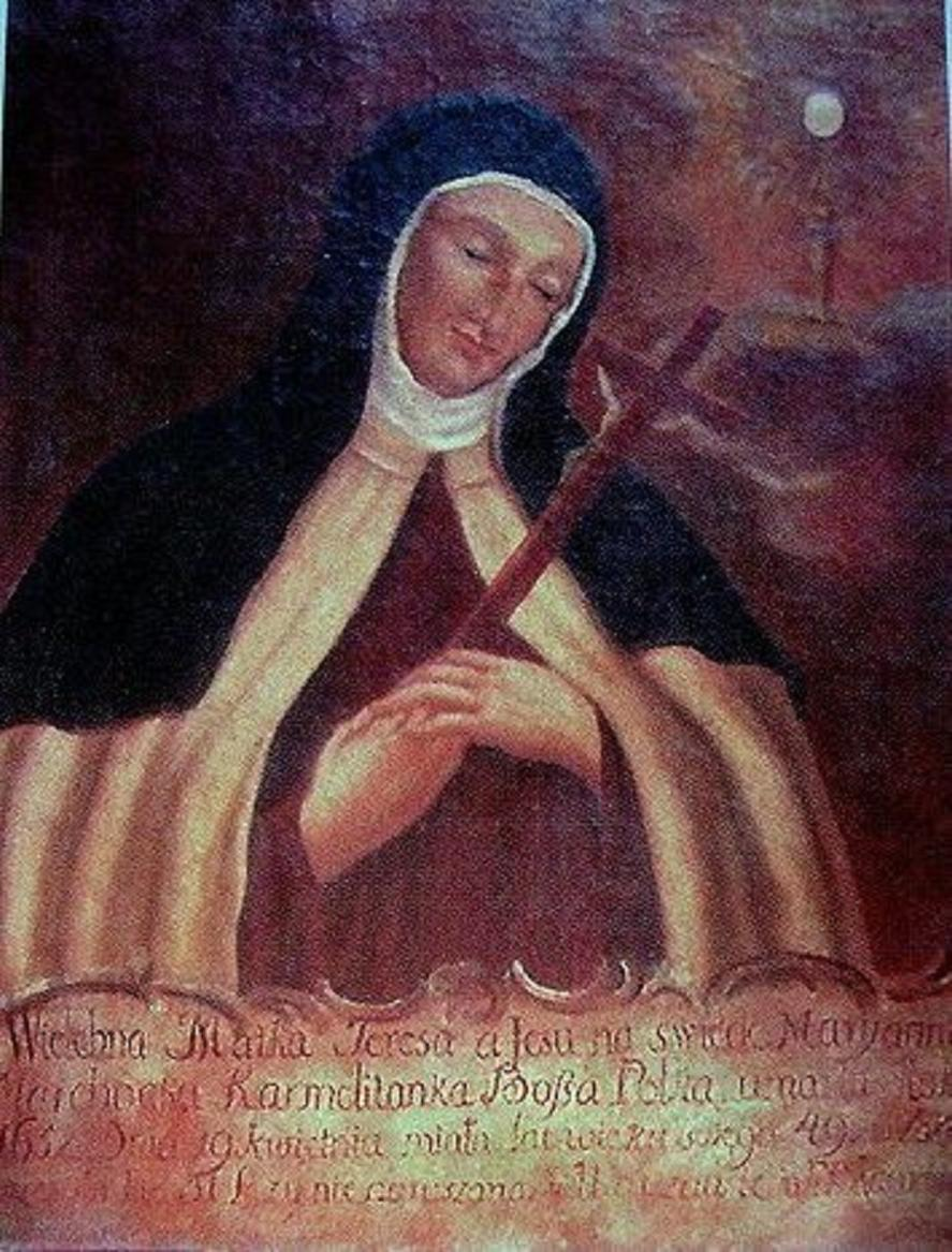 obraz przedstawiający Mariannę Marchocką